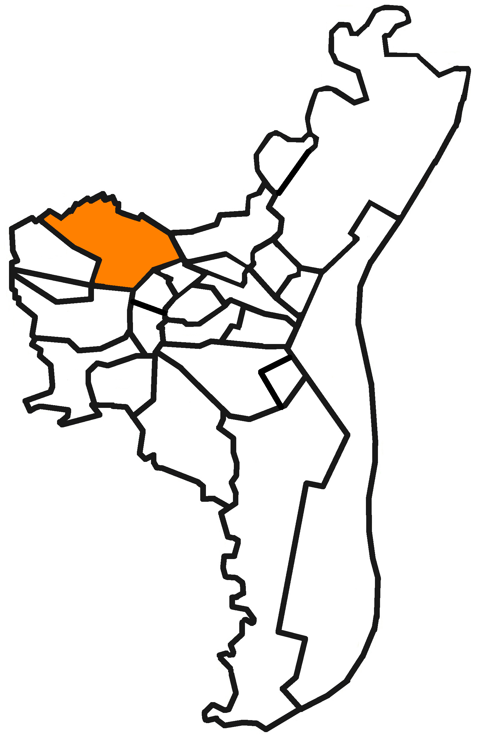 Localisation du quartier de Cronenbourg à Strasbourg